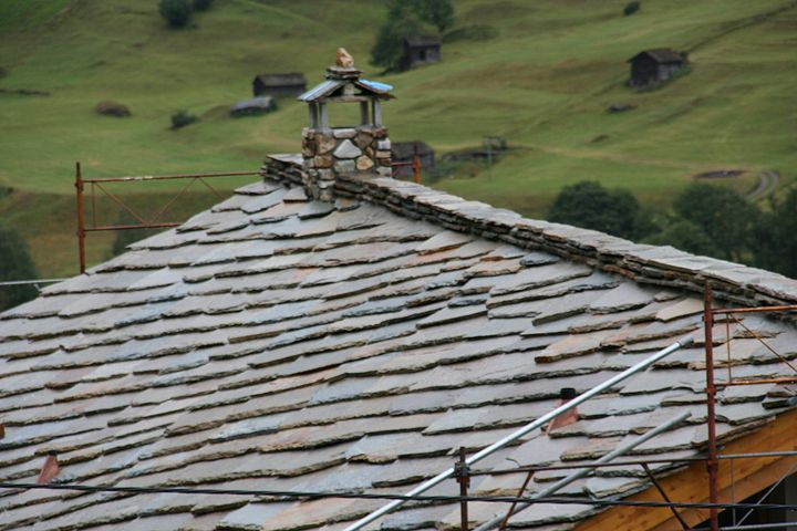 Construction d'un toit de lauzes neuf dans le village d'Evolène (Valais, Suisse). Vue après la pluie. Photo: PY.Stucki